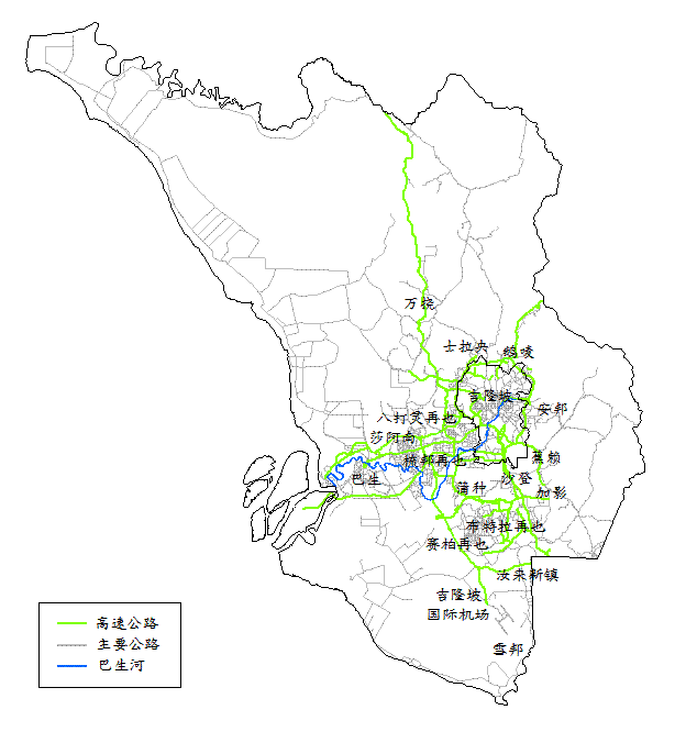 巴生河流域地图